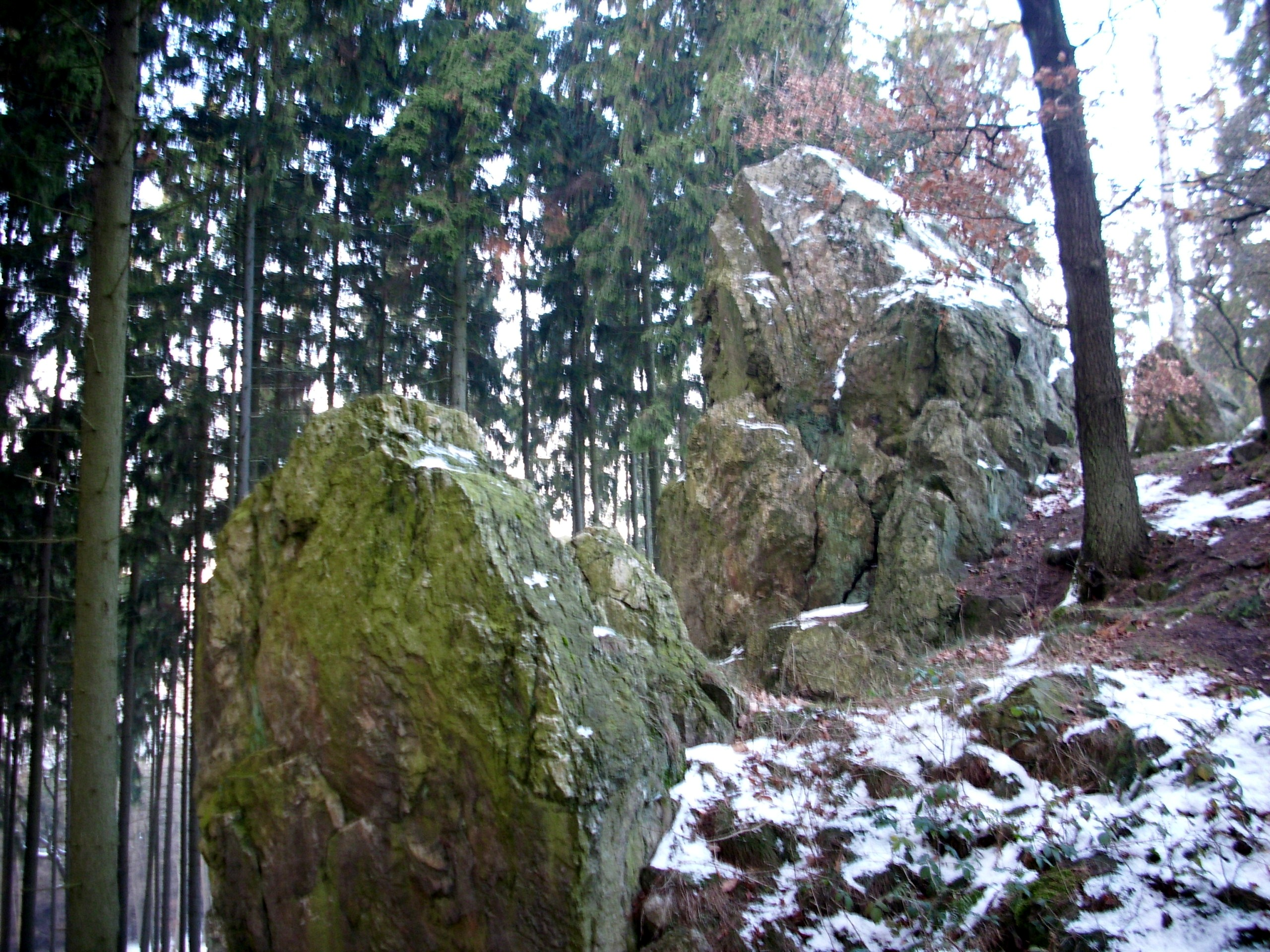 Quarzitfelsen Hohler Stein (Westzacken)